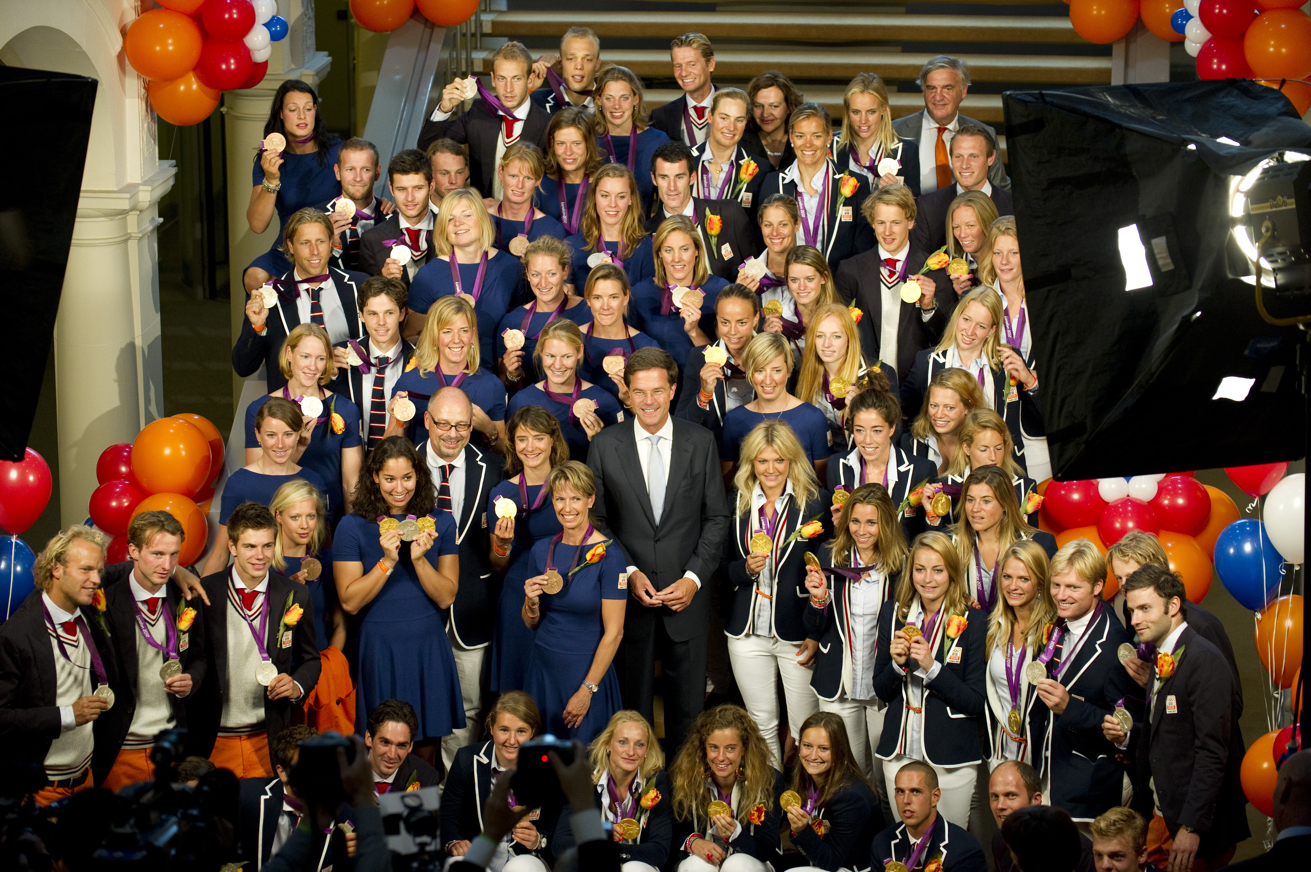 Groepsfoto van de Olympische medaillewinnaars samen met minister-president Rutte in 2012.